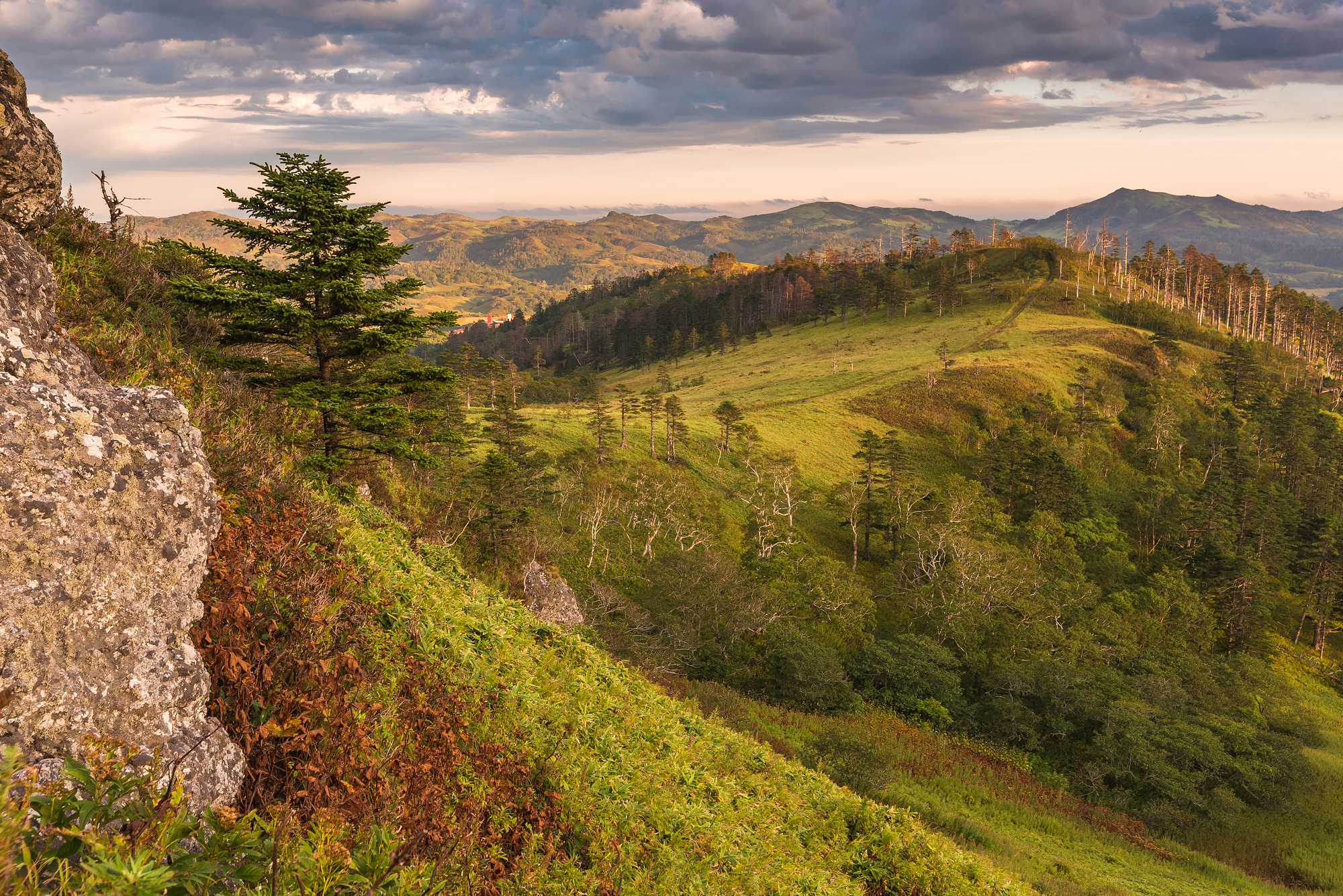 Малые Курилы: Расположен на островах Малой Курильской гряды: Шикотан, Зеленый, Юрий, Танфильева, Полонского, Анучина с прилегающими к ним скалами, банками, рифами и одномильной акваторией территориального моря РФ, Южно-Курильский городской округ, Сахалинская область This image is related to the protected area of Russia number 6500092